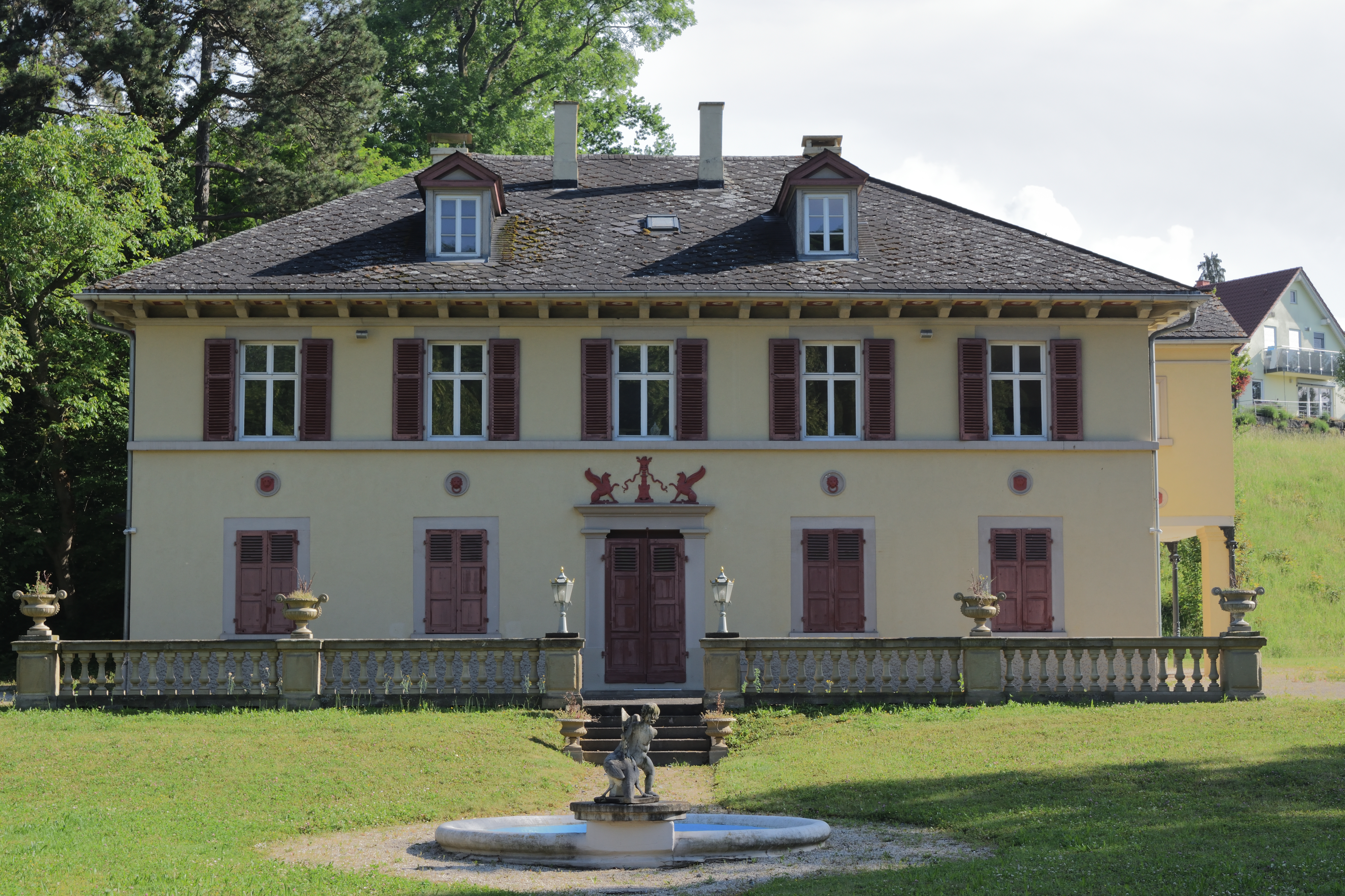 Landgut Marienwahl